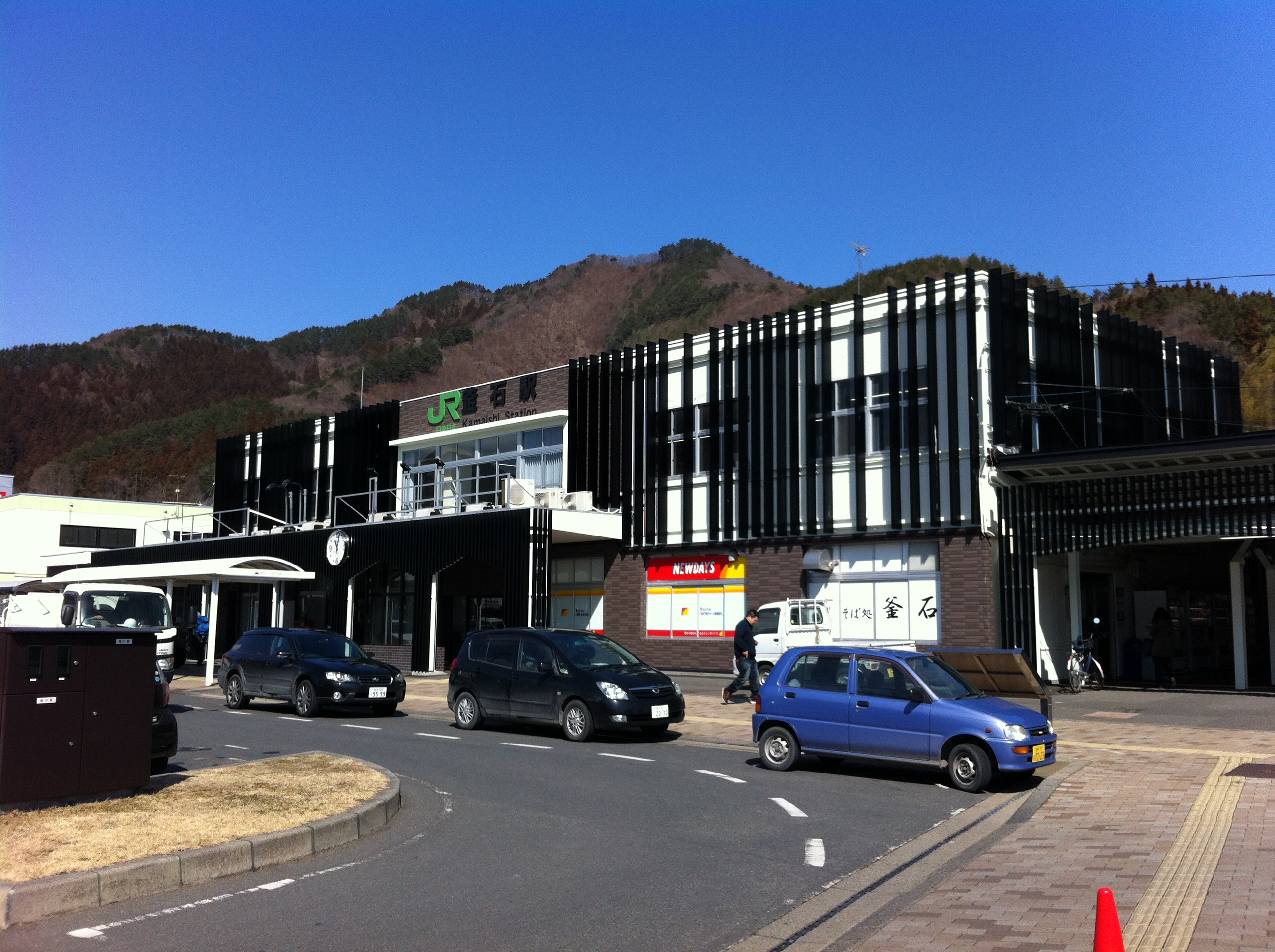 JR釜石駅新駅舎